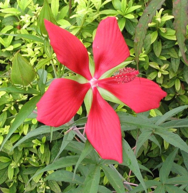 モミジアオイ（Hibiscus_coccineus、紅蜀葵） 撮影者:ja:利用者:sphl 撮影日:2005年8月10日 撮影地:ja:東京都ja:町田市 Category:草花画像